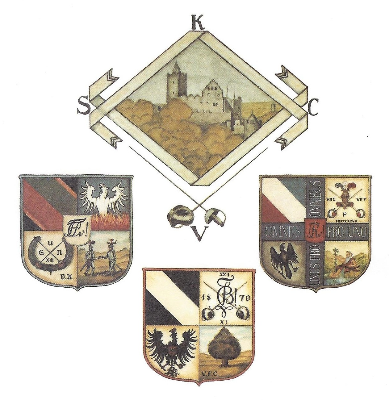 Kösener Raute und Wappen der Corps im Tübinger Senioren-Convent